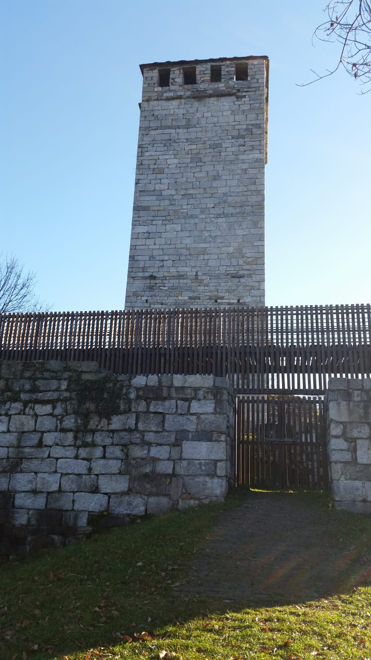 torre di buccione